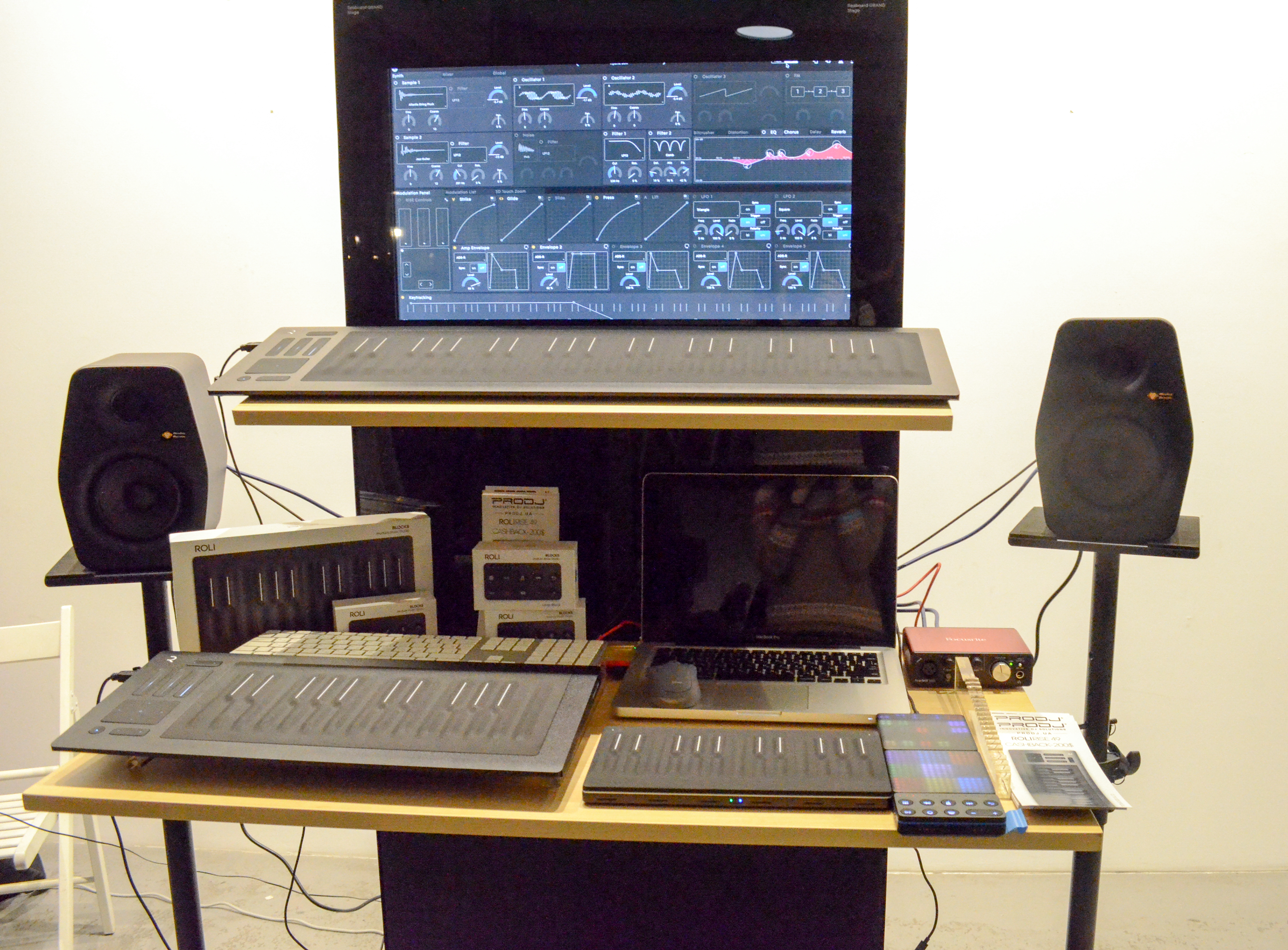 Другий музичний форум The Selector Pro в Києві. Стенд продукції компанії ROLI